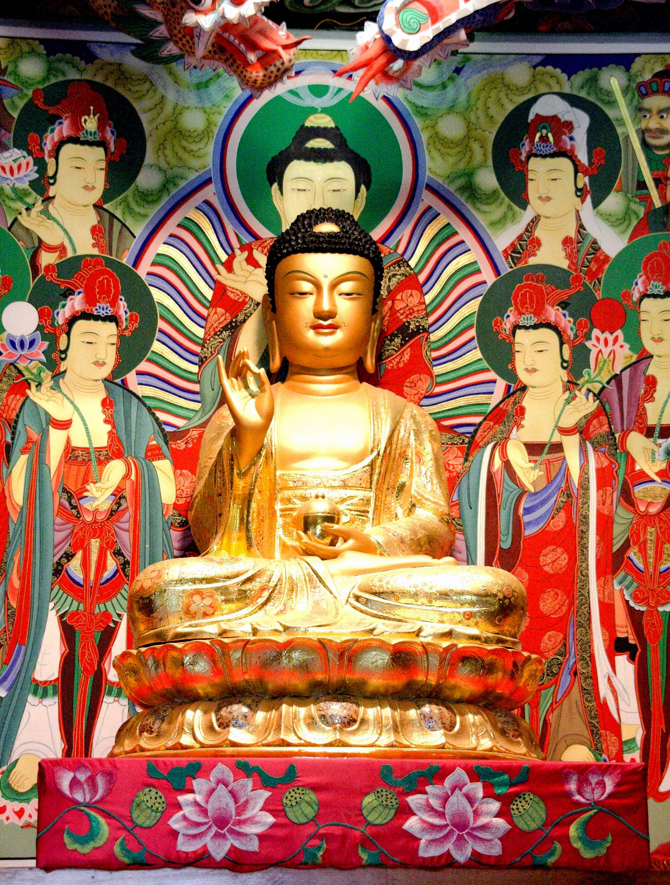 Korea-Gangneung-Deungmyeongnakgasa-Medicine Buddha-01.jpg